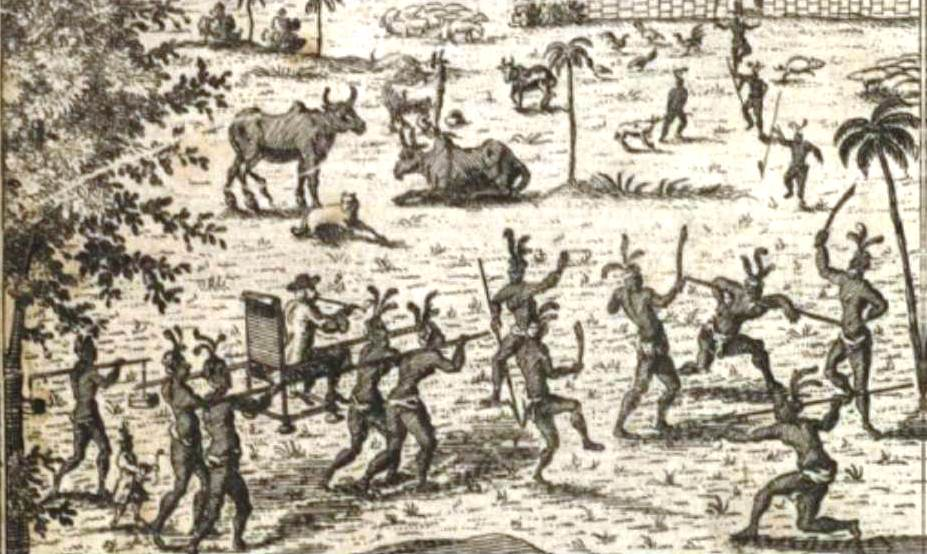 Ausschnitt Innenseite der Reisebeschreibung 1752